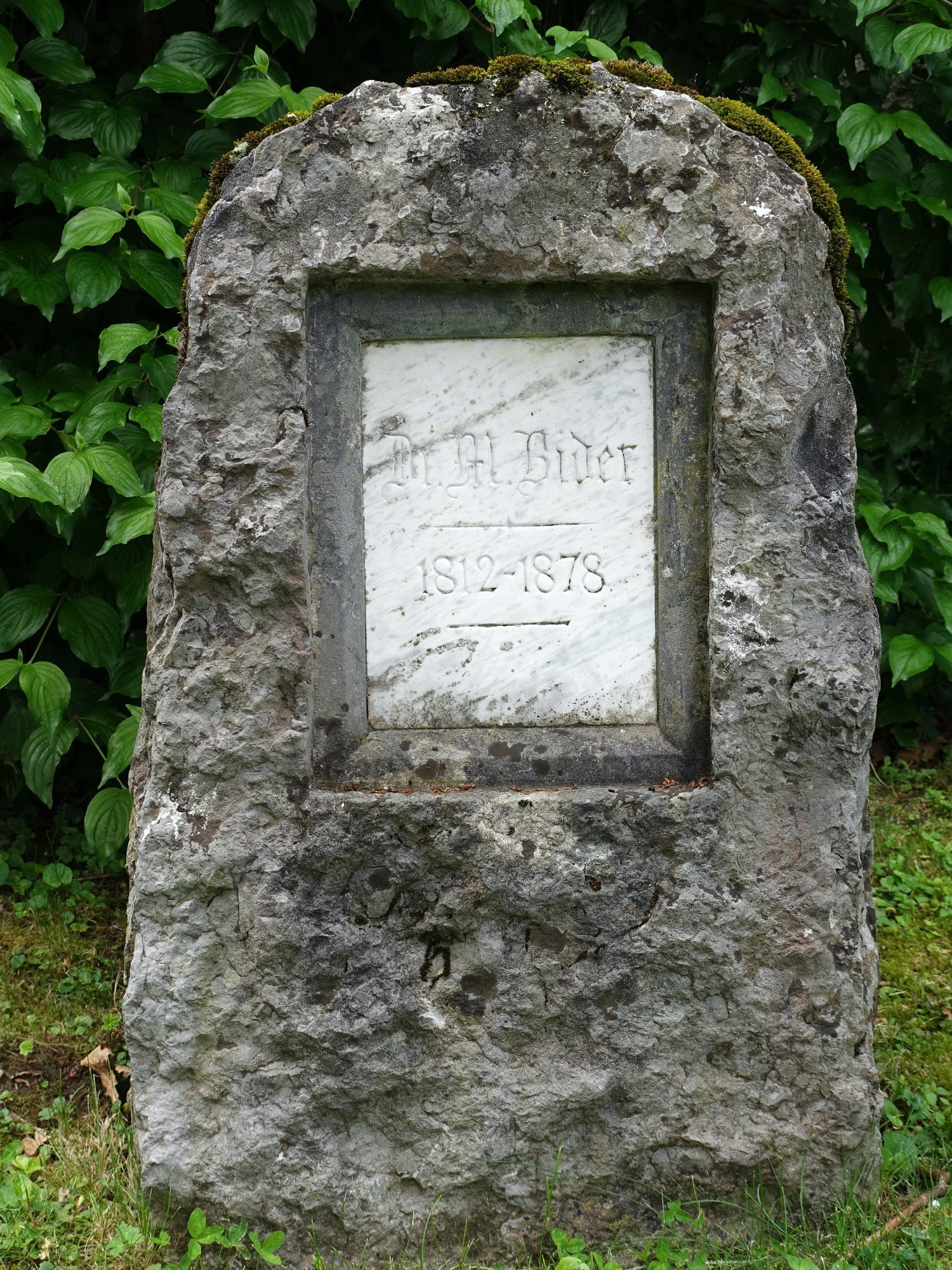 Martin Bider (1812–1878) Arzt, Politiker, Mäzen. Grab auf dem Friedhof von Langenbruck, Basel-Land, Schweiz.